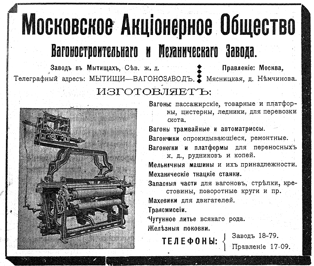 Рекламное сообщение Московского акционерного общества вагоностроительного и механического завода. 1913 г.